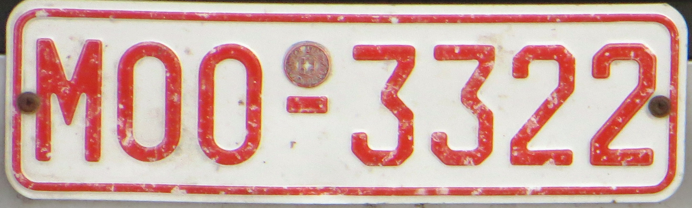 Grieks kentekenplaat concessionary